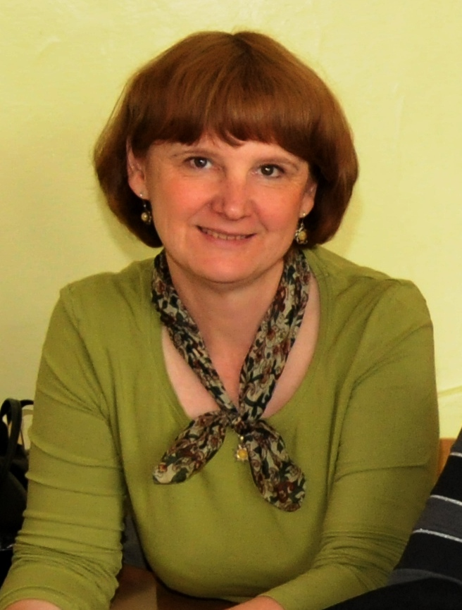 Ewa Bąkowska - wnuczka gen. Mieczysława Smorawińskiego, który zginął w Katyniu. Poległa w katastrofie samolotu prezydenckiego pod Smoleńskiem 10 kwietnia 2010 r.